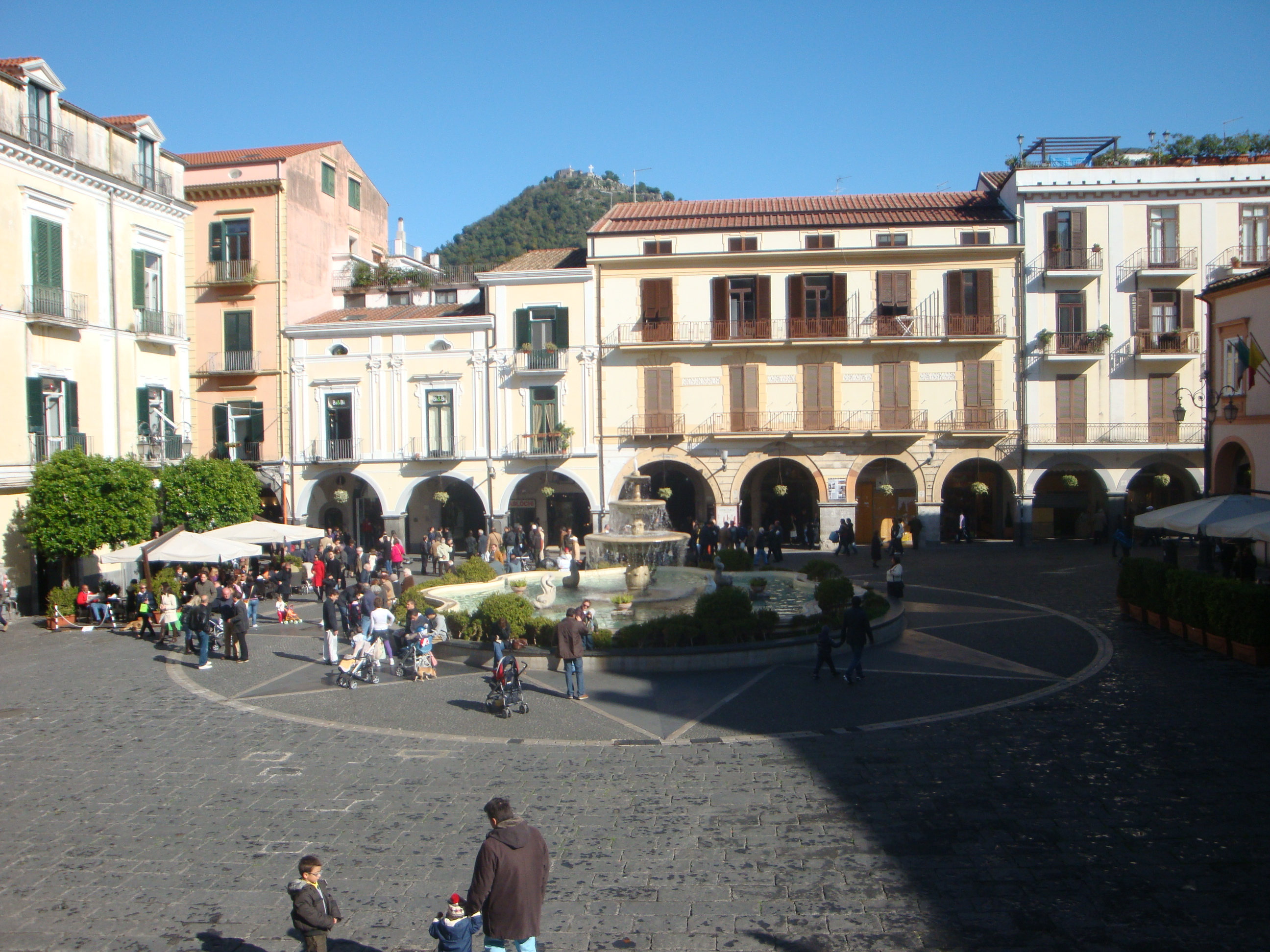 La piazza di Cava de' Tirreni